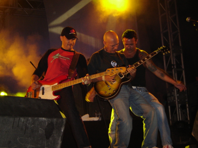 Concierto de Seguridad Social 2005